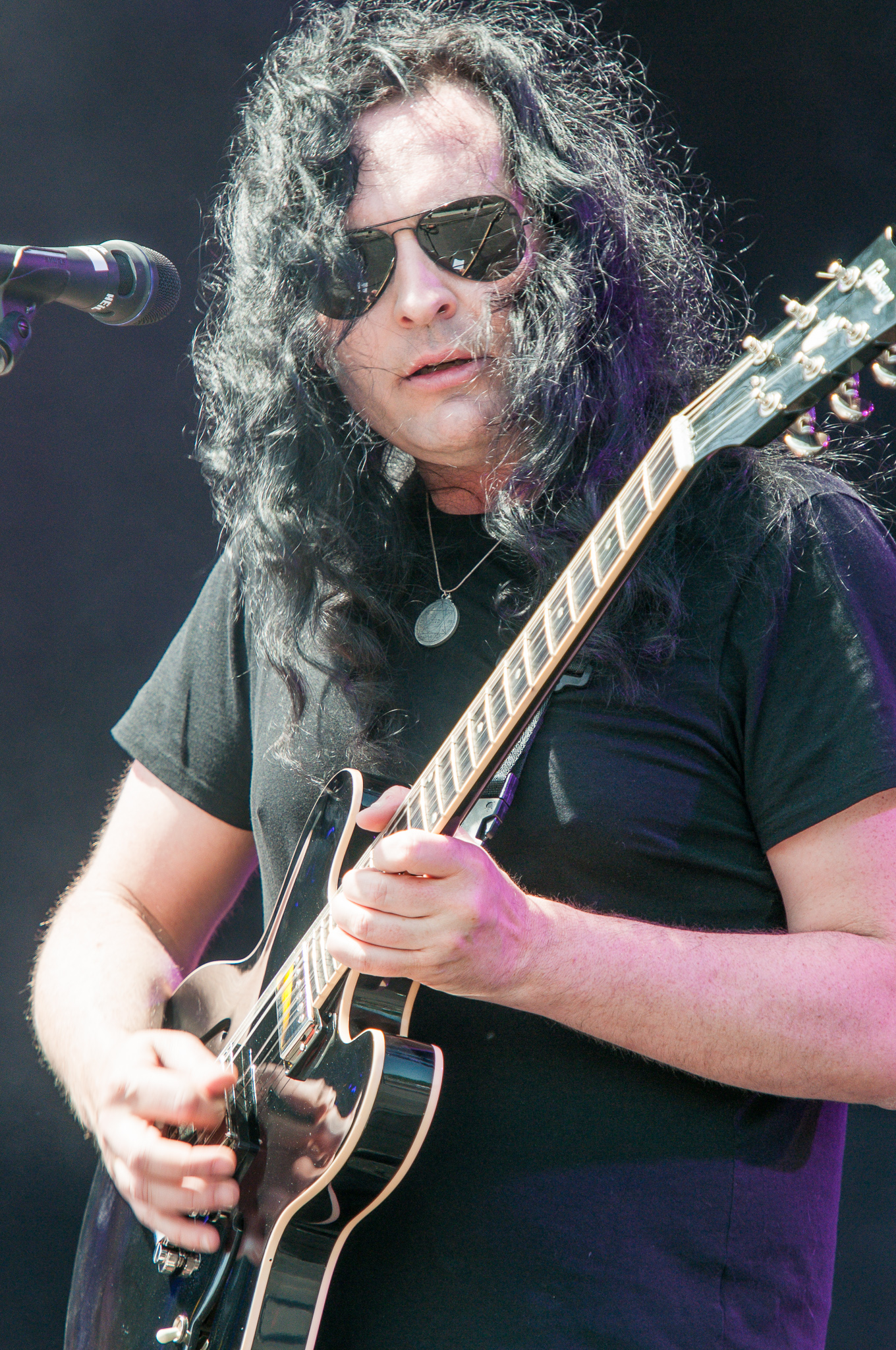 ARGO-Konzerte,Ben Philips,Centerstage,Konzert,Livekonzert,Livemusik,Musik,RiP,Rock im Park 2014,The Pretty Reckless